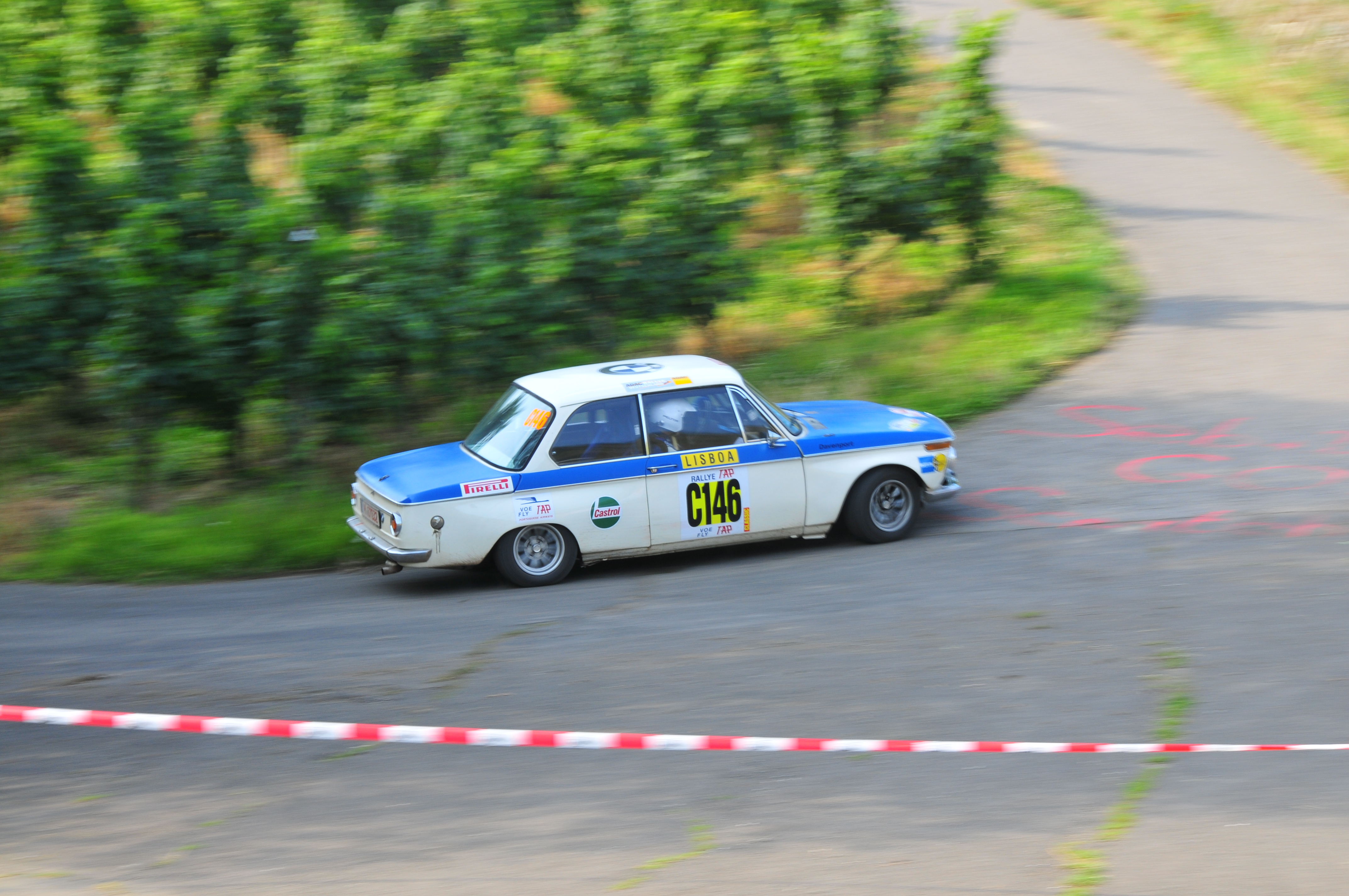 BMW 2002 driven during the 2008 Rallye Deutschland.